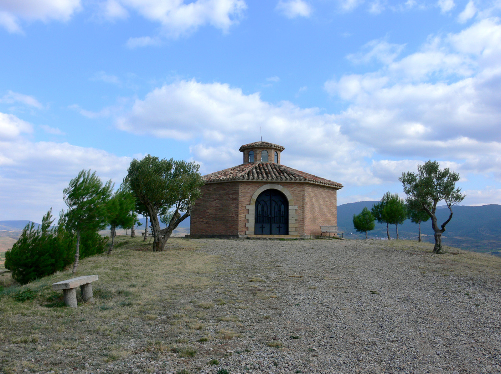 Ermita de Salalmanchurri en Cárdenas (La Rioja - España).